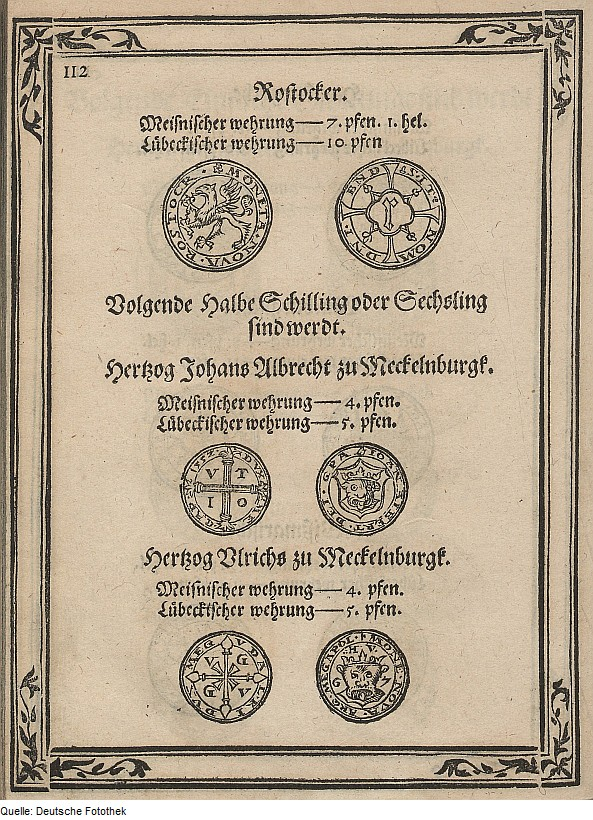 Original image description from the Deutsche FotothekGeldwesen & Münzwesen & Münze & Schilling & Sechsling